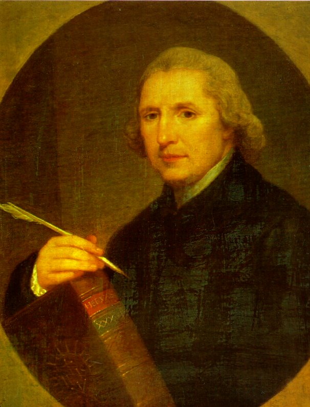 Retrato de Lorenzo Hervás y Panduro.